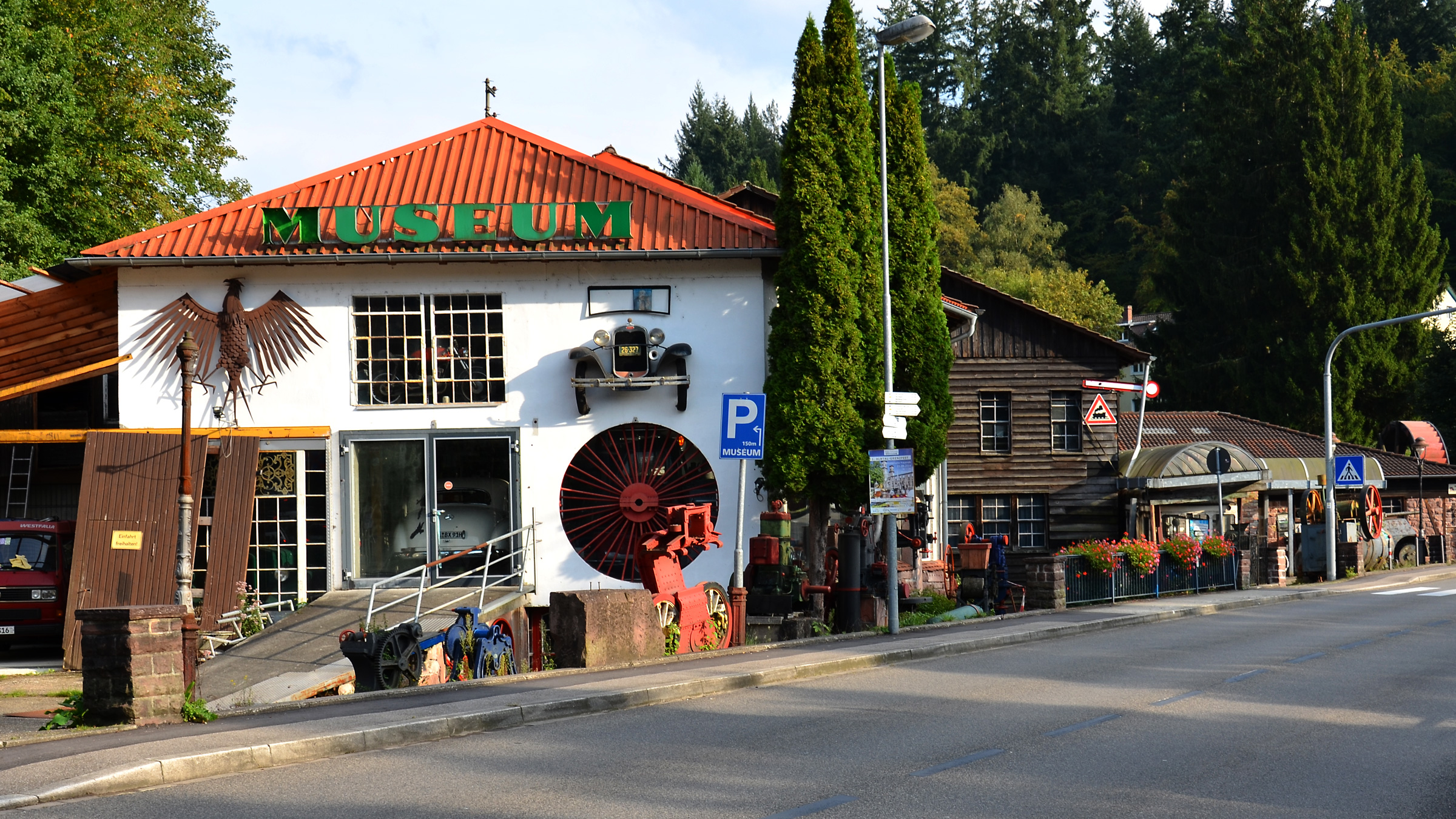 Fahrzeugmuseum Marxzell